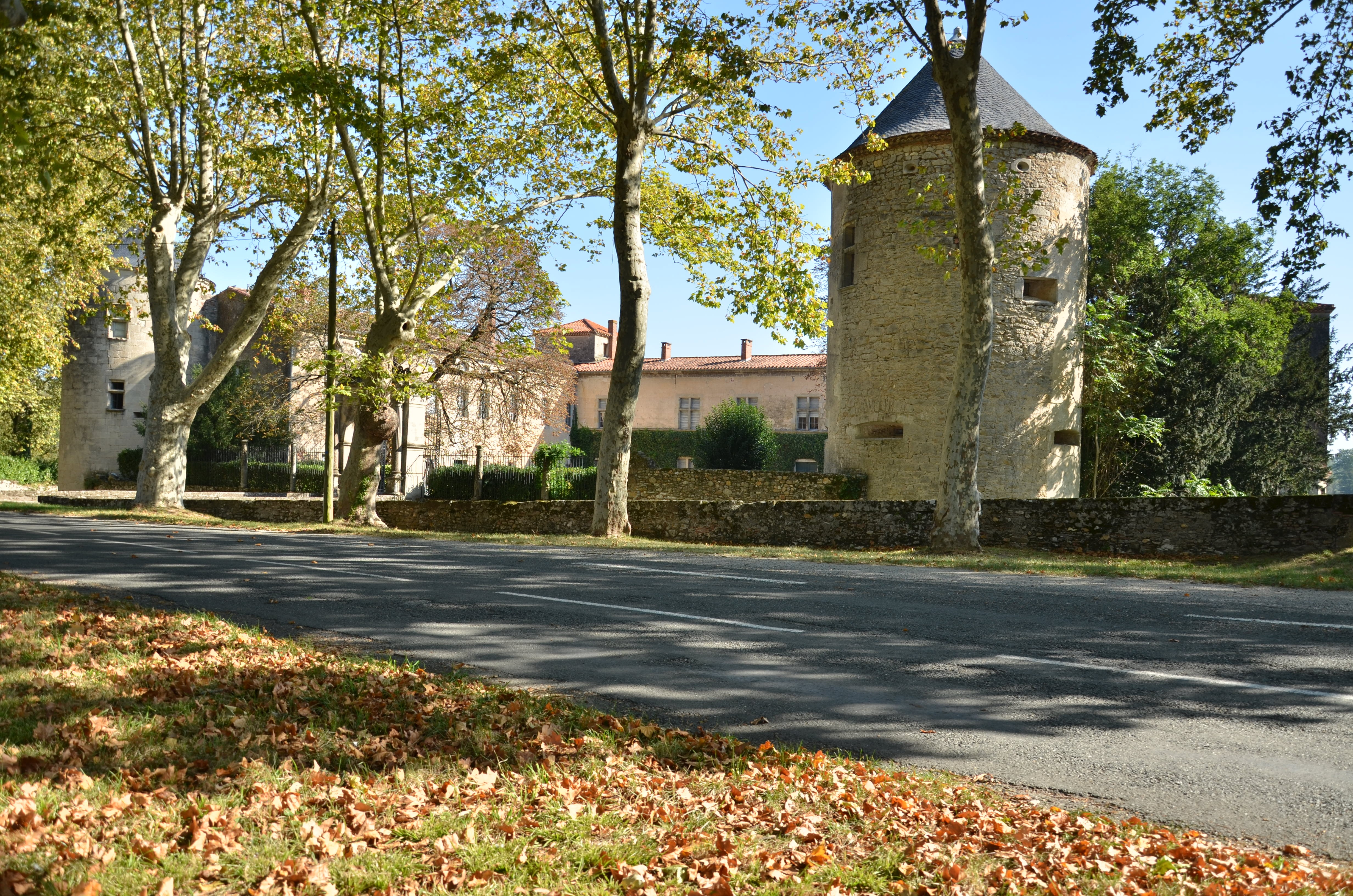 Château d'Hauterive à Castres (Tarn) .